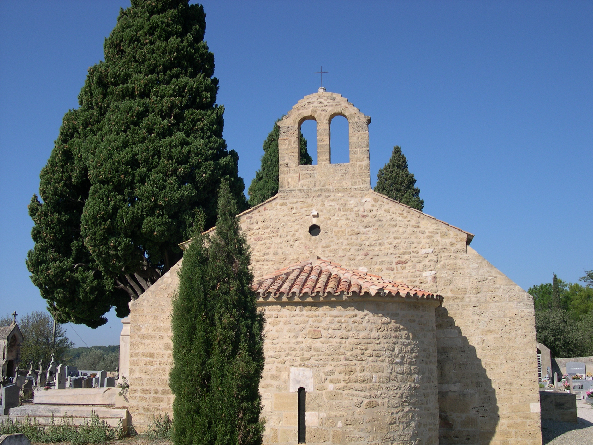 située dans le cimetière de Miramas le Vieux.